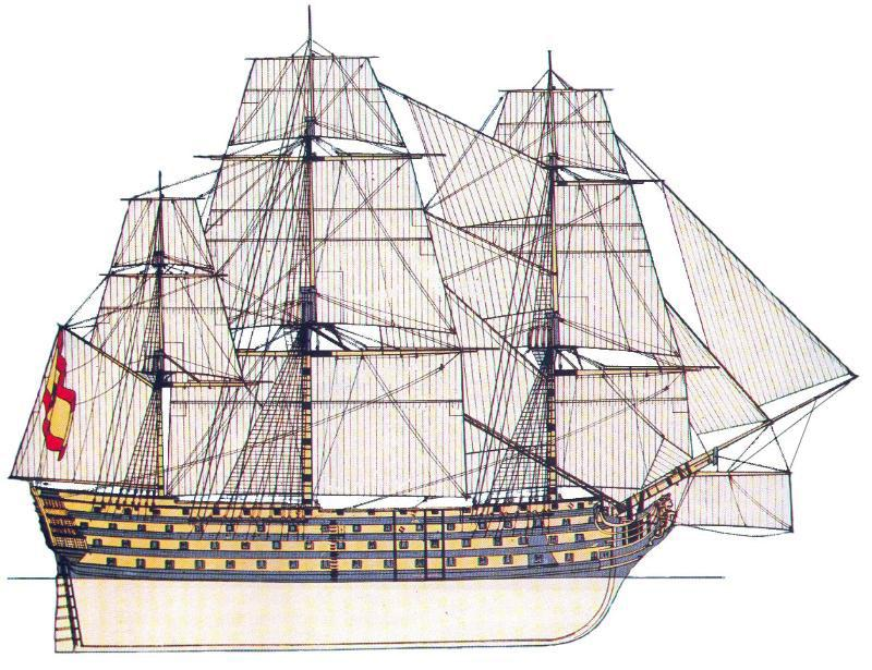 Navío Santisima Trinidad de la Armada Española, realizado por Rafael Berenguer (1822-1890), museo naval de Madrid